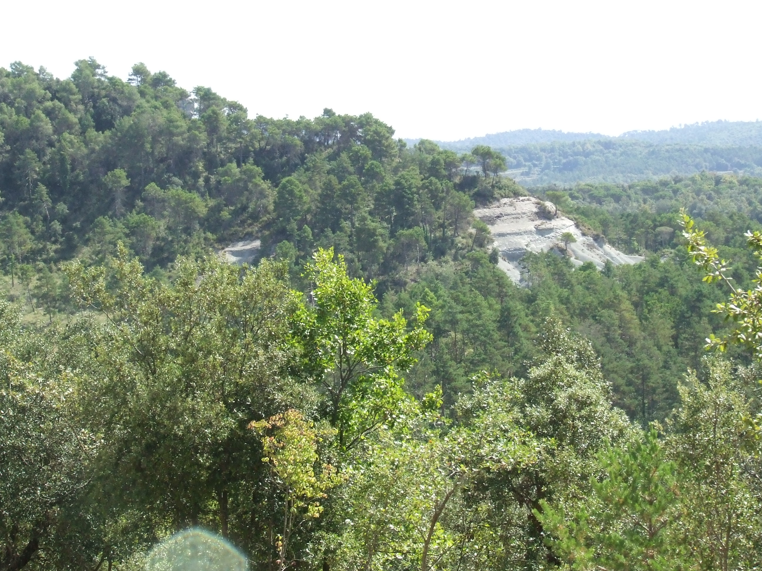 El Bosc i el Grony del Vilardell (Castellcir, Moianès)